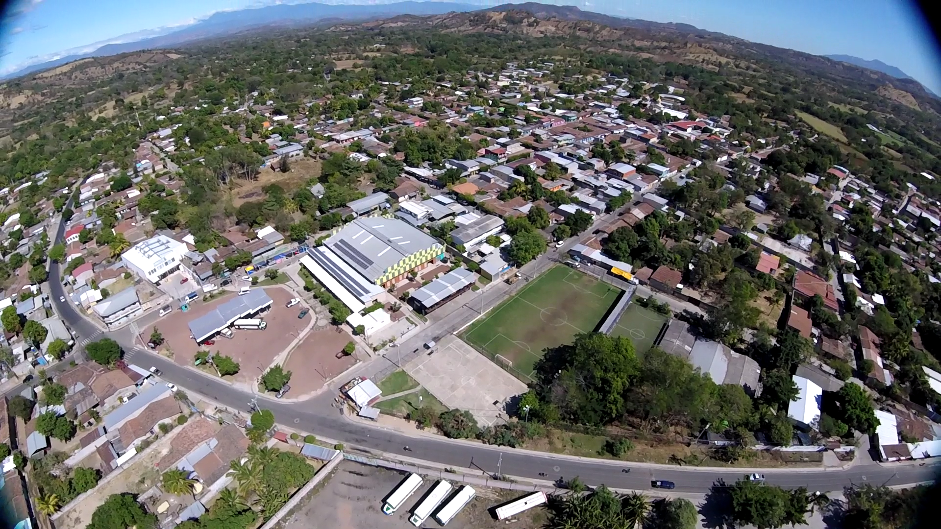 Casco urbano de la cabecera del municipio.